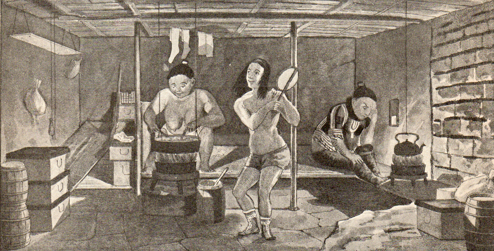 Vinterhus i Grønland omkring 1830, opført af sten og tækket med græstørv.